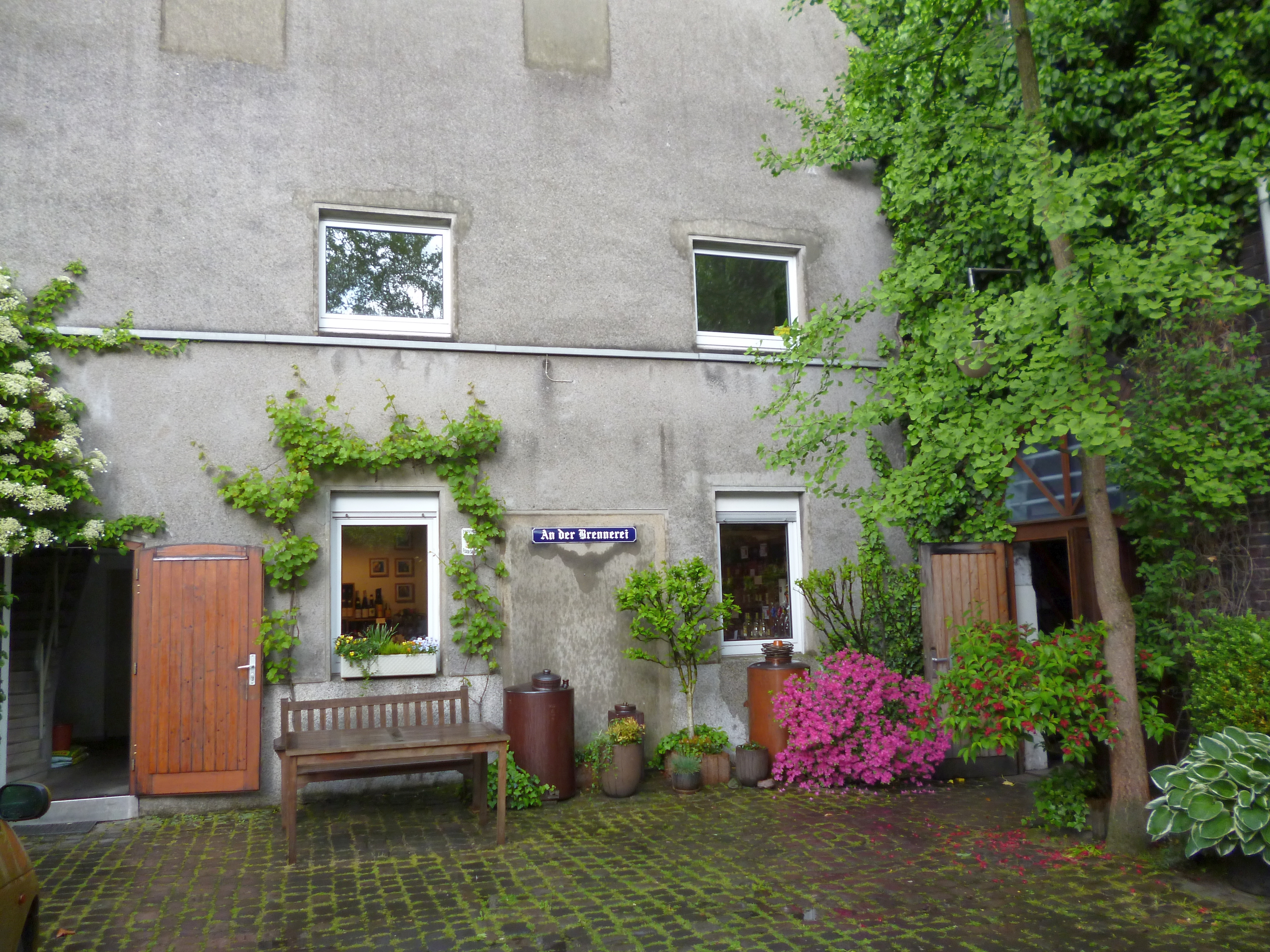 Brennerei Eicker & Callen in Herne-Wanne